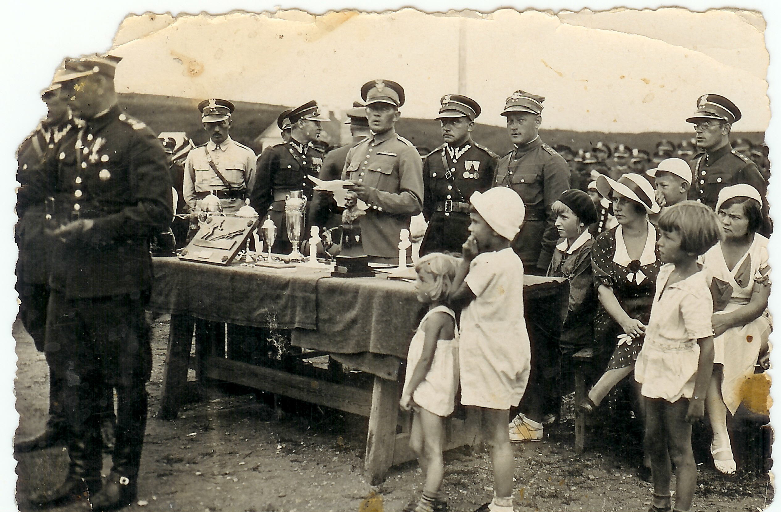 Wręczenie nagród podczas zawodów sportowych, pierwszy z lewej ppłk. K. Bąbiński, Troki 1934 r.